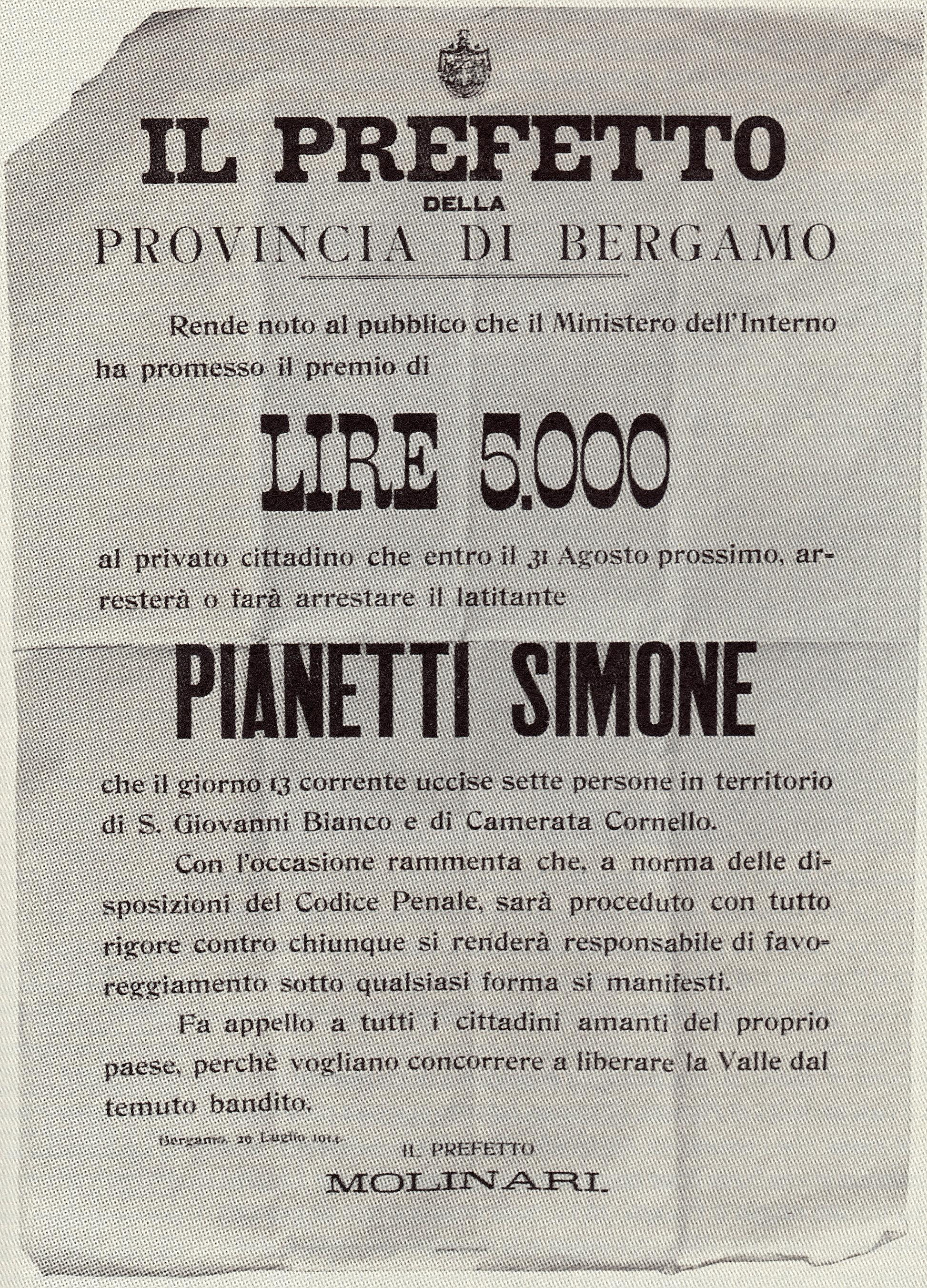 Taglia su Simone Pianetti, assassino del XX secolo